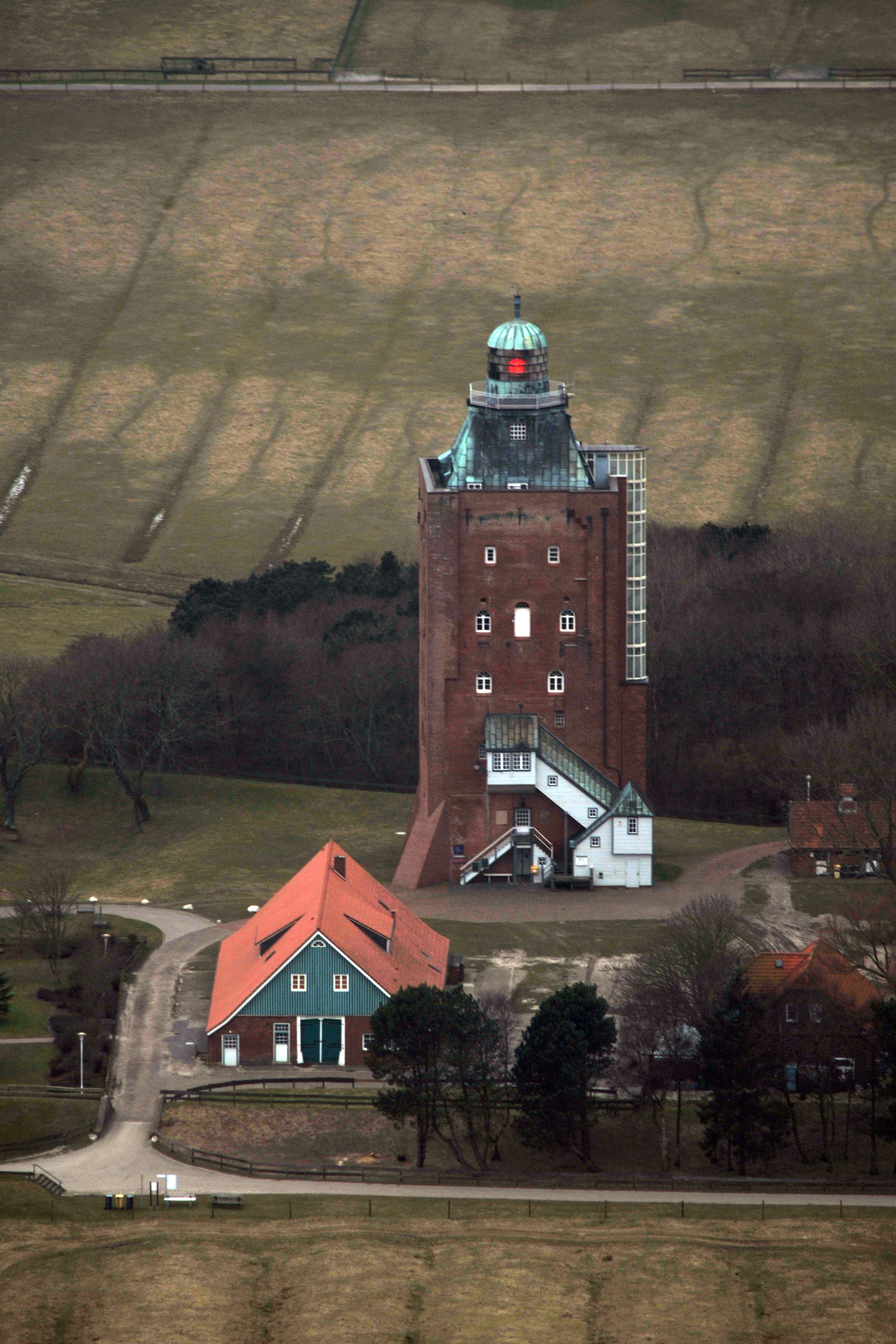 Fotoflugkurs Cuxhaven 2013: Leuchtturm Neuwerk